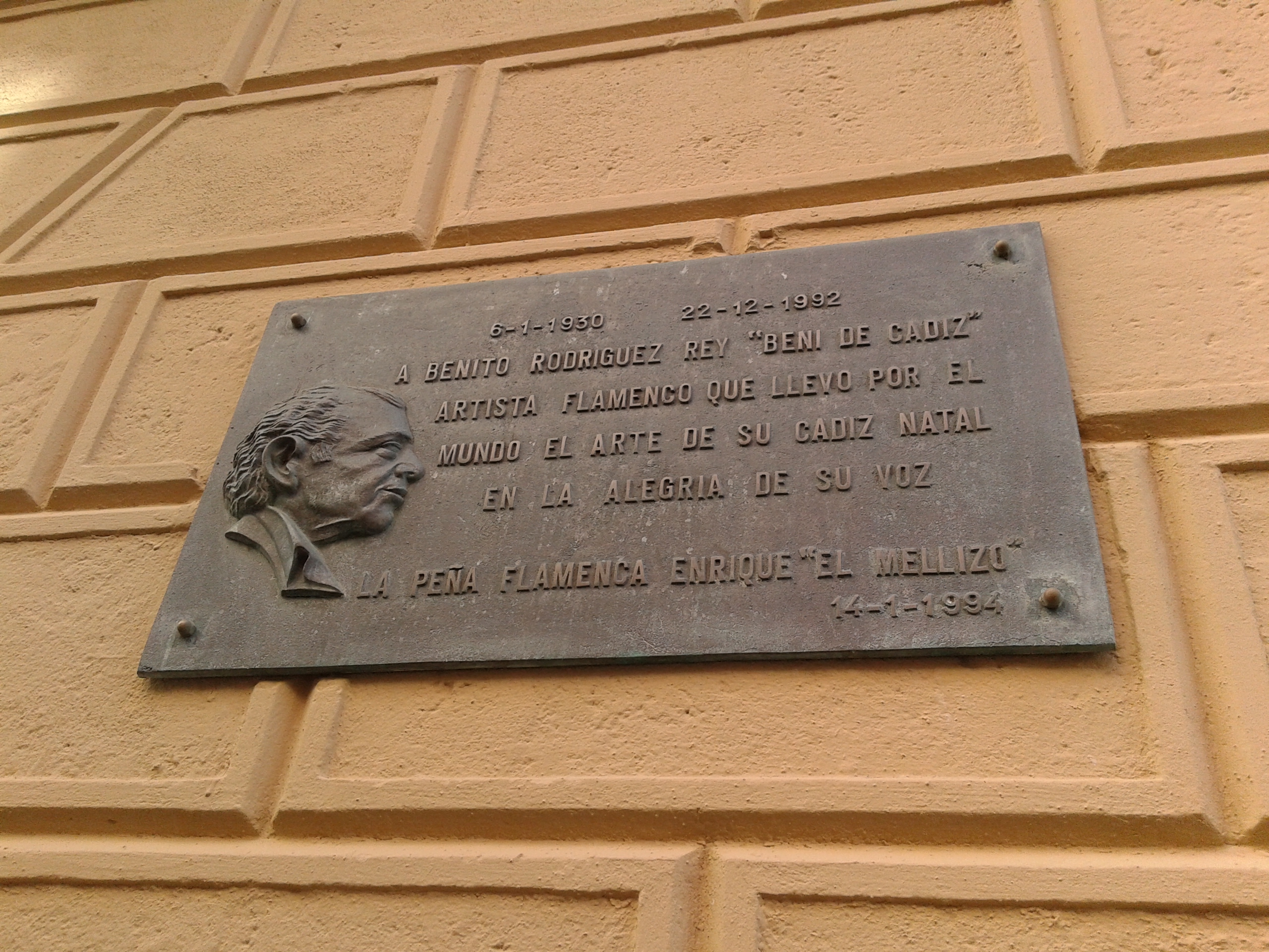 Placa en la casa natal de Beni de Cádiz (Cádiz, España)